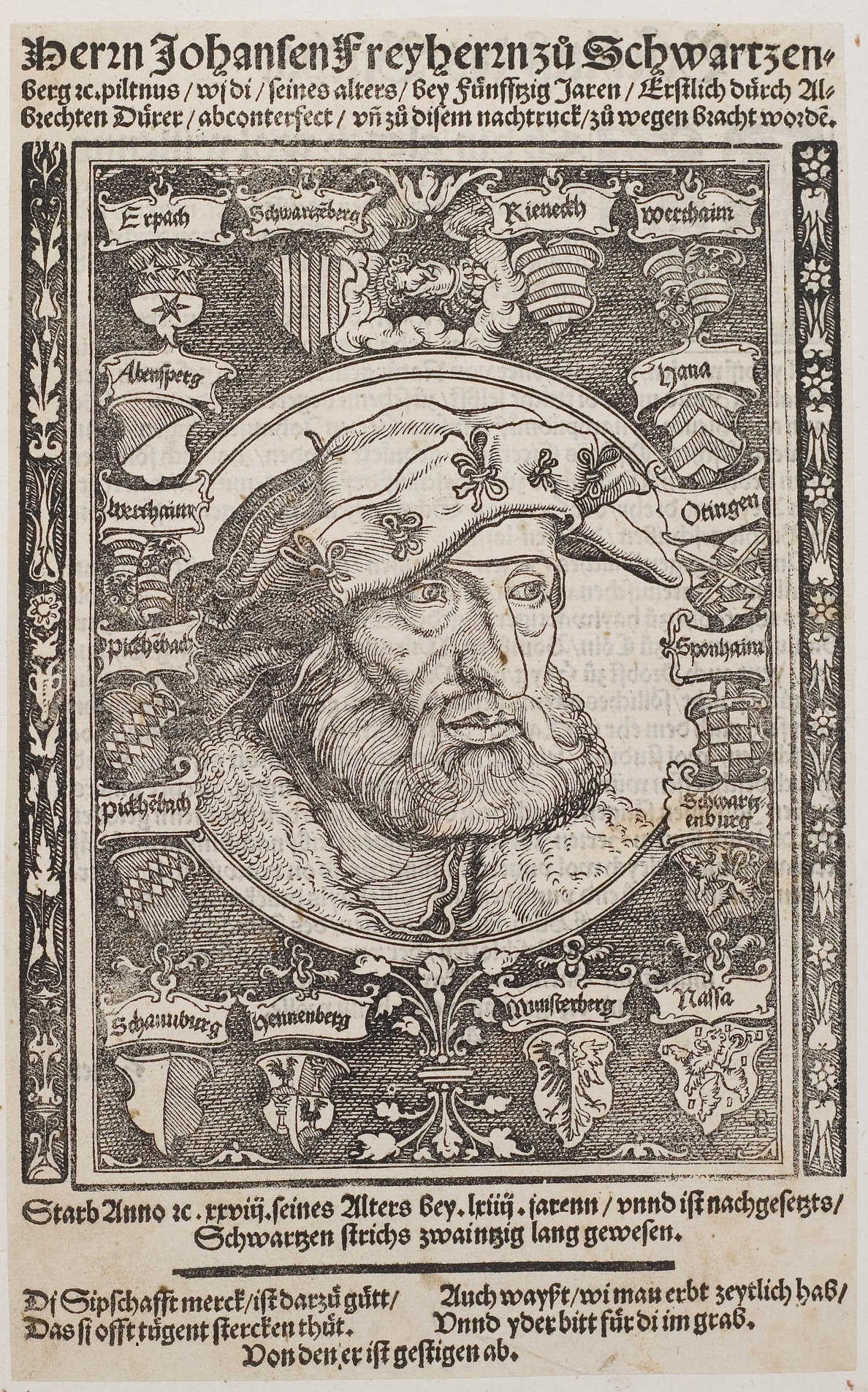 Grafik aus dem Klebeband Nr. 2 der Fürstlich Waldeckschen Hofbibliothek Arolsen Holzschnitt nach Albrecht Dürer: Johann von Schwarzenberg (1643–1528)